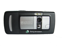 K750iRueckseite